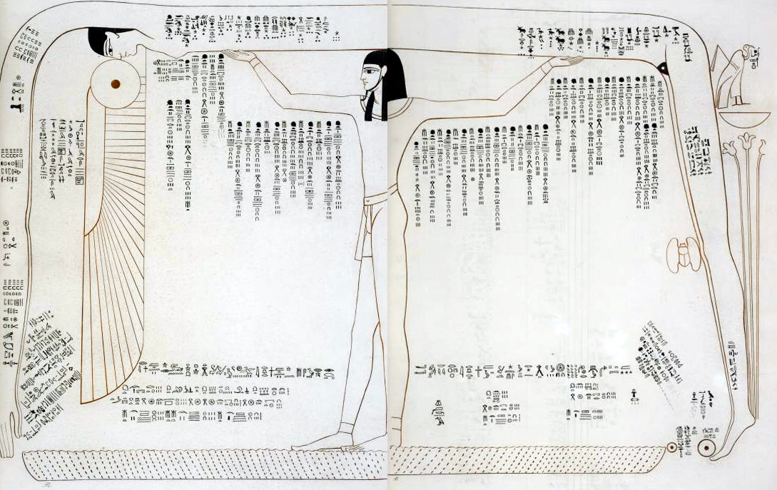 représentation astronomique de la tombe de Ramsès IV dans la vallée des rois